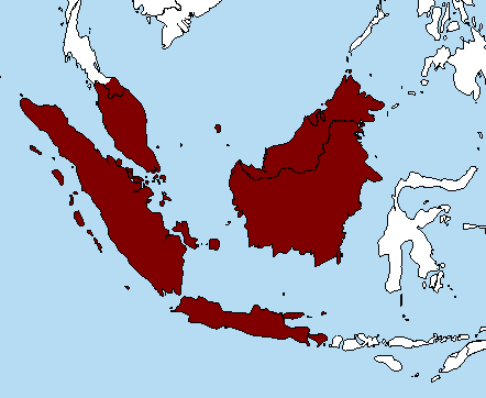 Carte du hotspot du Sundaland.